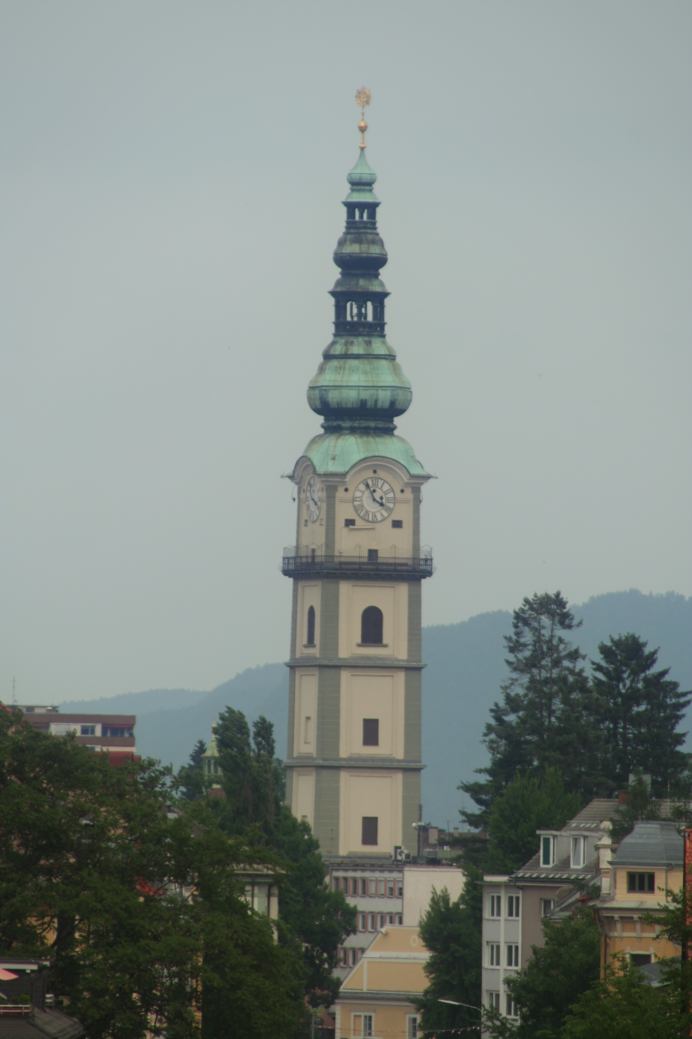 St_Egid_Klagenfurt Template:Dooh